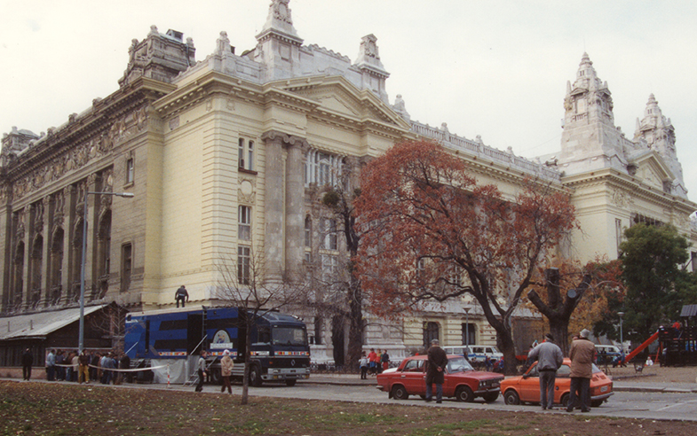 premier car HD français en demonstration en Hongrie en 1989 (technologie double D1)